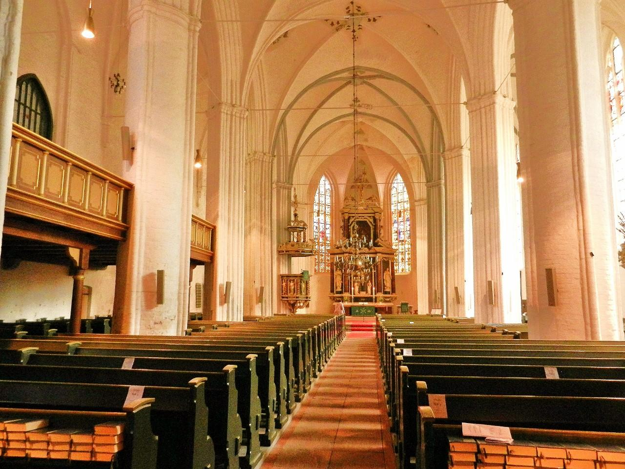 Innenraum Richtung Osten von St. Wilhadi, Stade